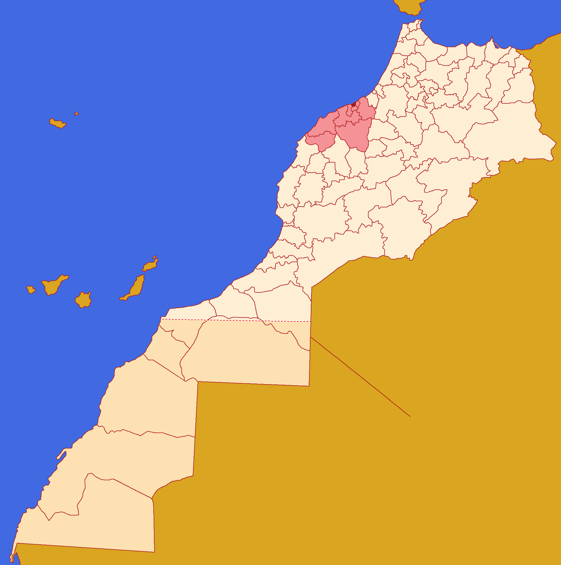 Localização da prefeitura de Casablanca, dentro da região de Casablanca-Settat, dentro de Marrocos, conforme a reforma administrativa de 2015